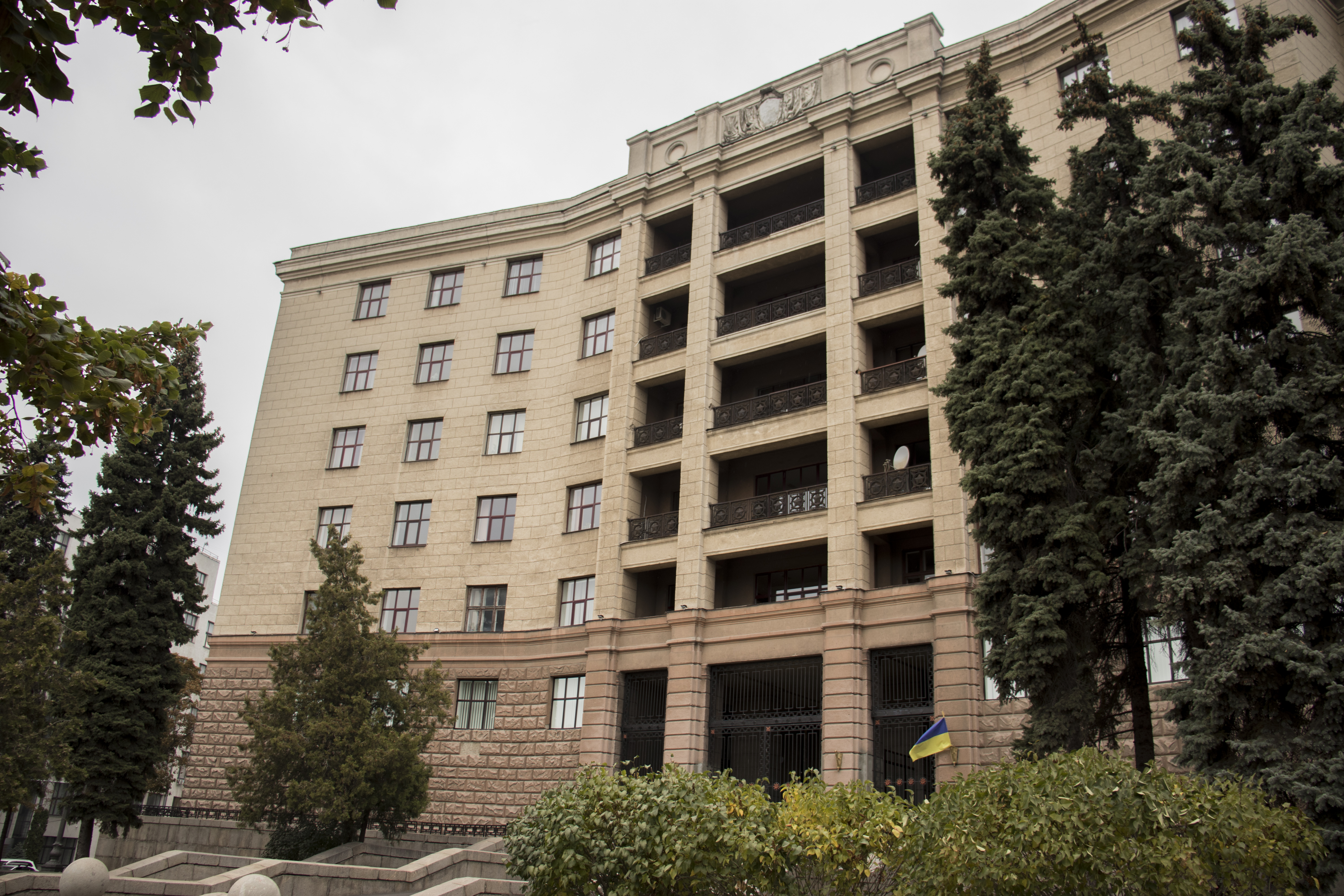 Будинок кооперації, Харків, майд. Свободи, 6